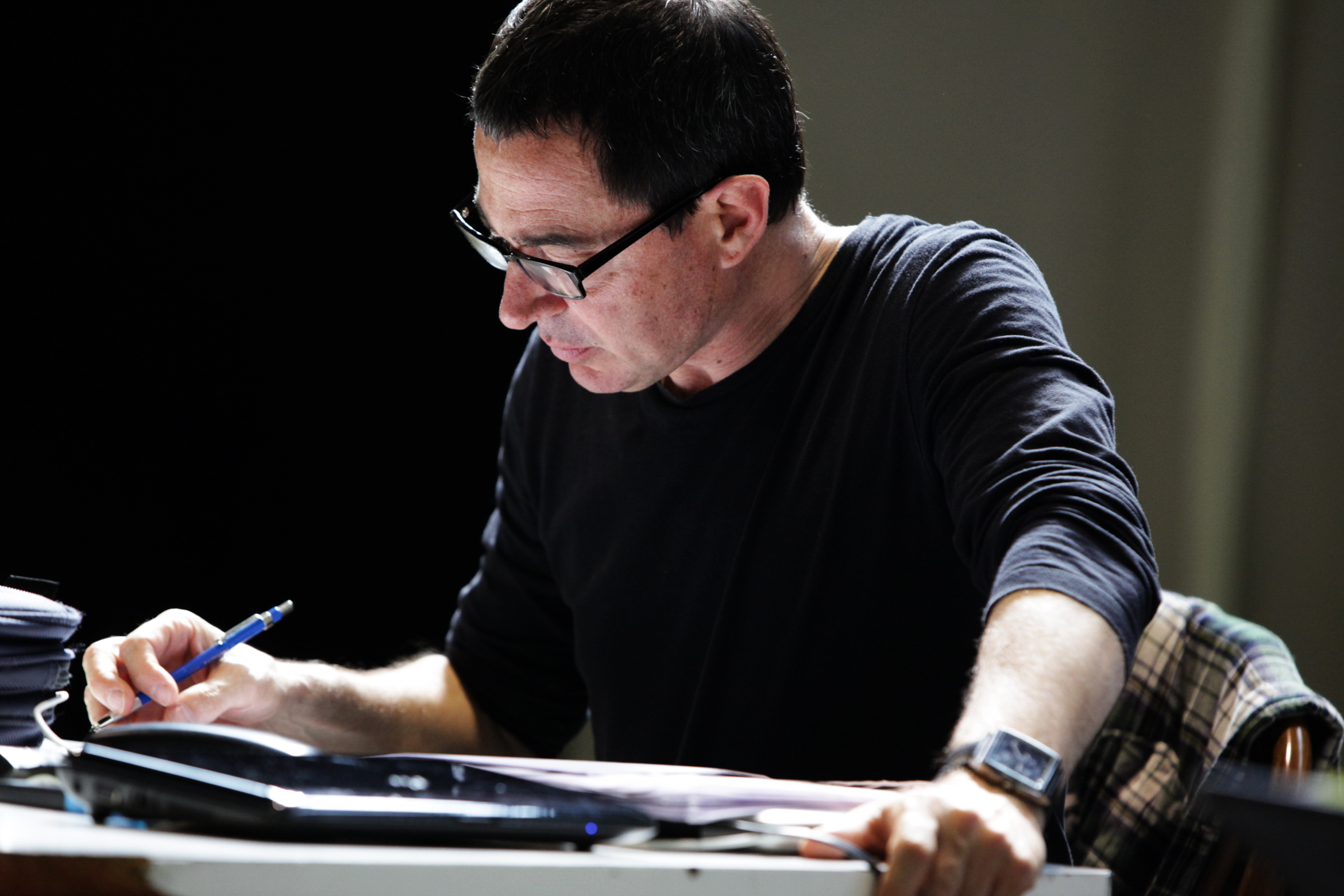 Àlex Ollé Director Artístico La Fura dels Baus